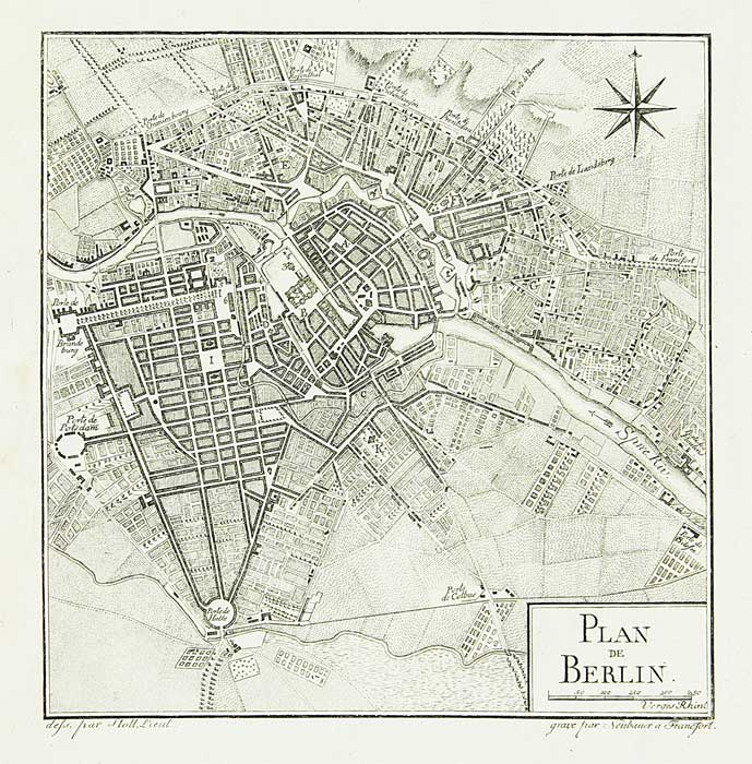 План Берлина времён Семилетней войны